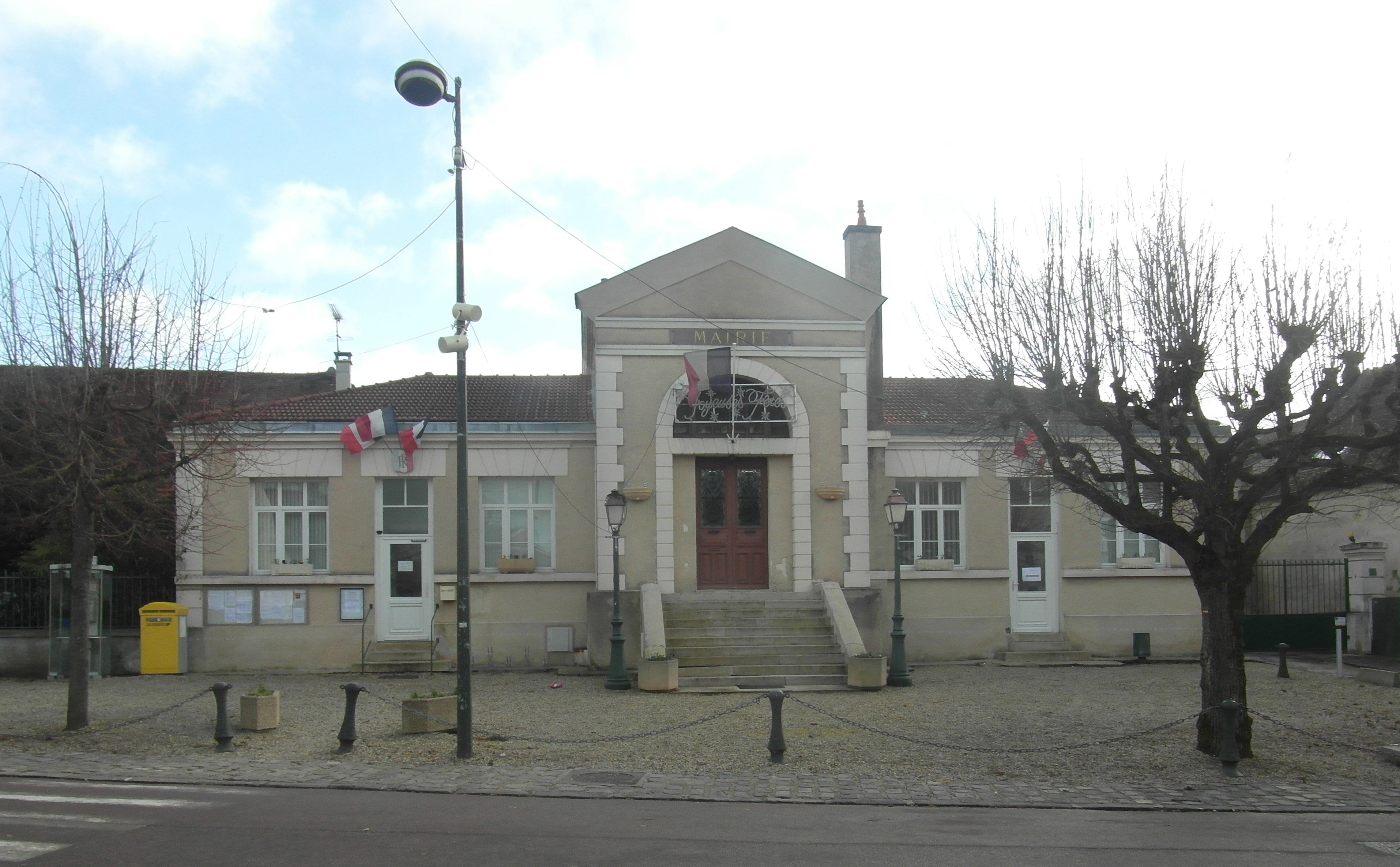 Mairie de Perigny, Val-de-Marne